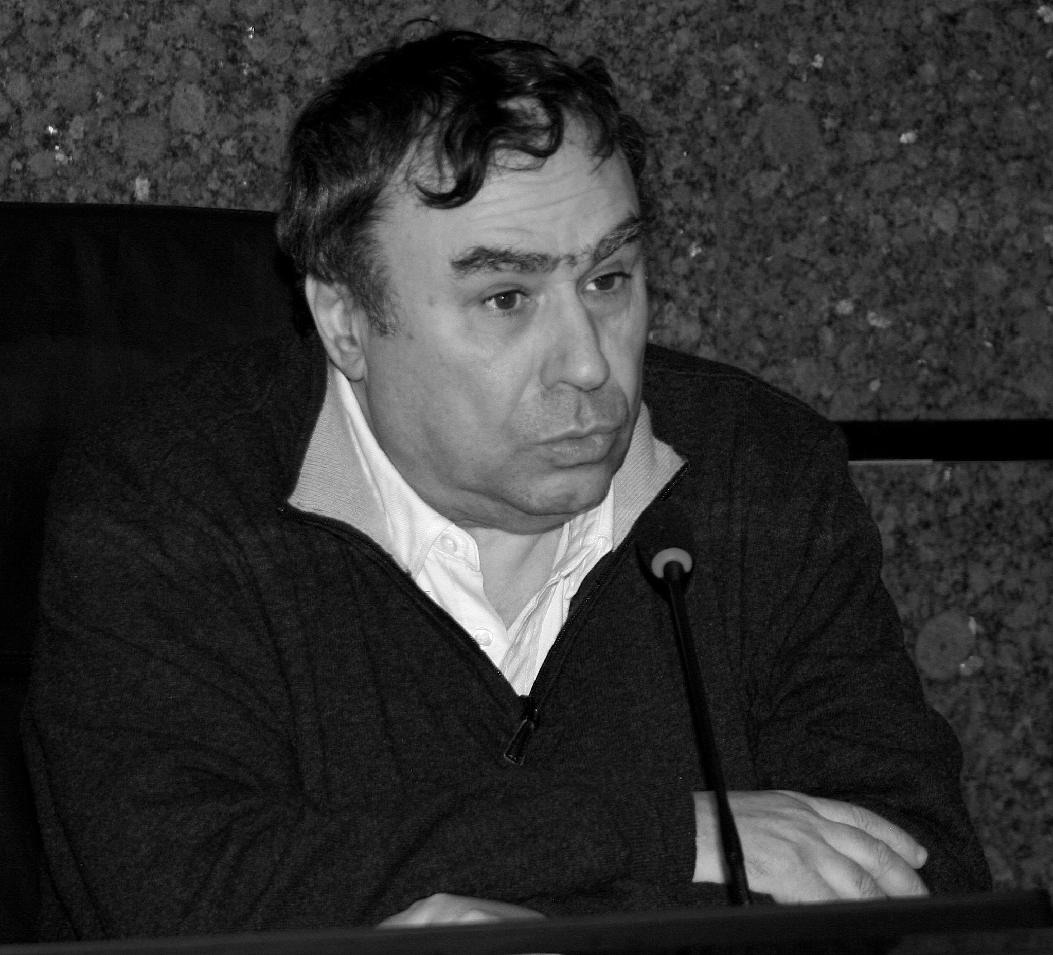 Benjamin Stora, né le 2 décembre 1950 à Constantine en Algérie, est un historien et Professeur des universités à Paris 13 et l'INALCO. Ses recherches portent sur l'histoire du Maghreb contemporain, l'Algérie coloniale, les guerres de décolonisation et l'immigration en France.